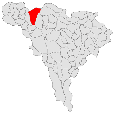 Categorie:Hărţi ale judeţului Alba